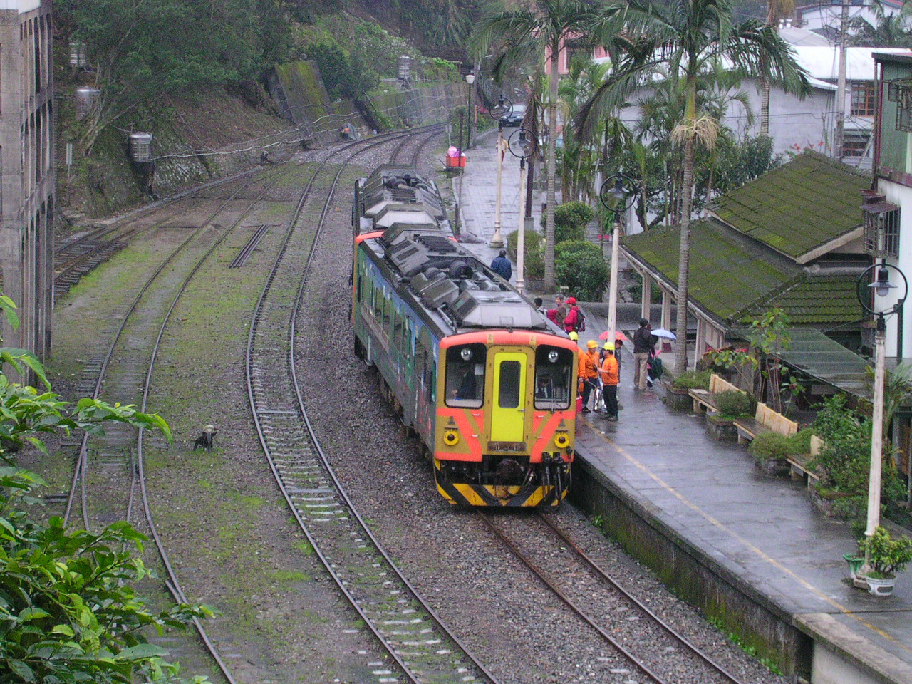 平溪線菁桐車站 Bân-lâm-gú: Pîng-khe-suànn Tshinn-tông Tshia-tsām. 平溪線菁桐車站